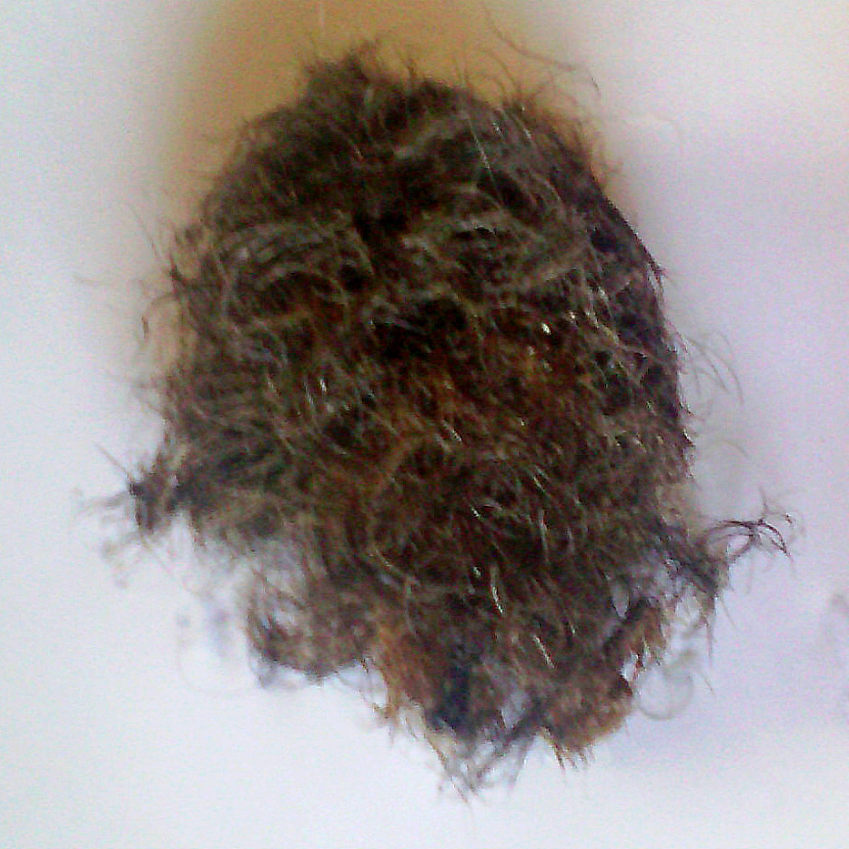 Сбритая борода